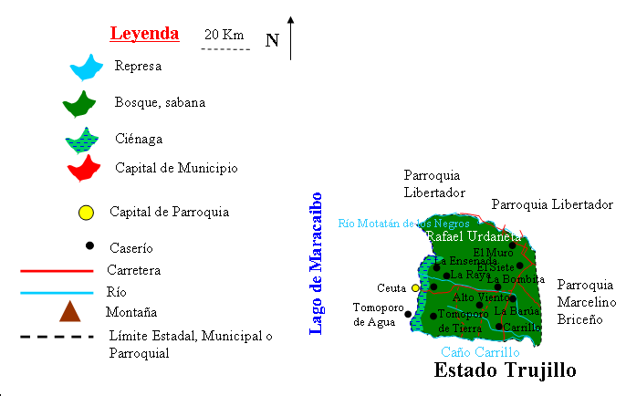 Mapa de la Parroquia Rafael Urdaneta, Municipio Baralt, Estado Zulia, Venezuela